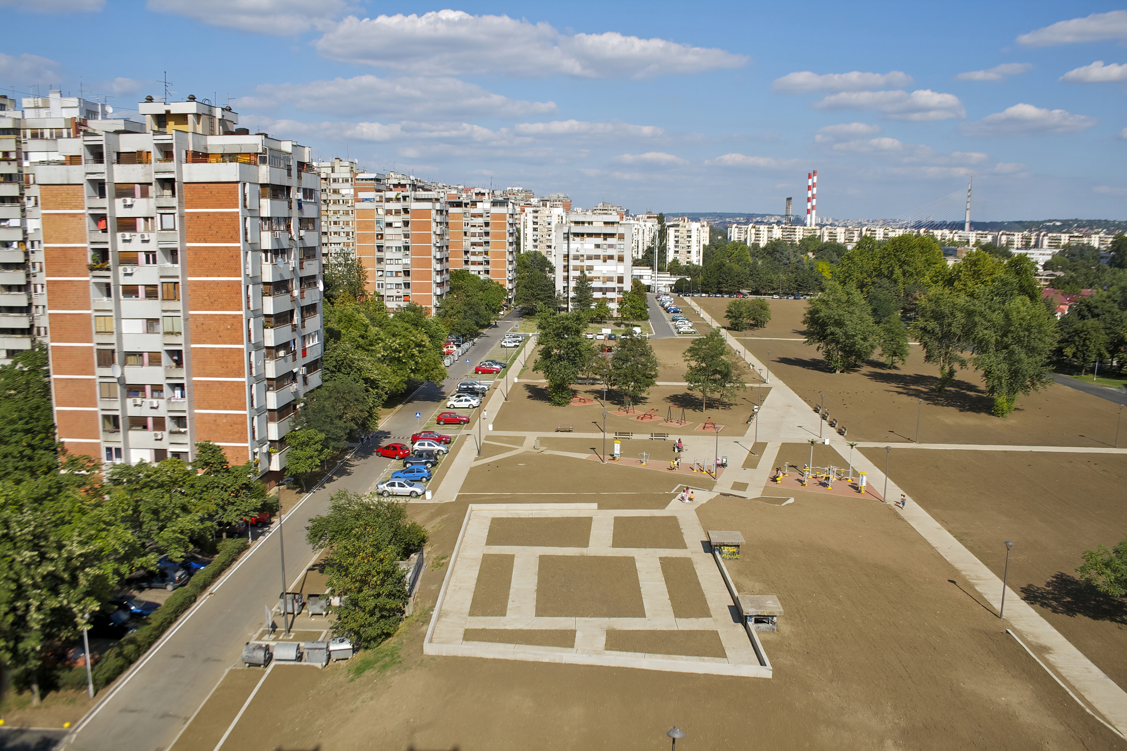 Нови паркић у Блоку 70, Нови Београд